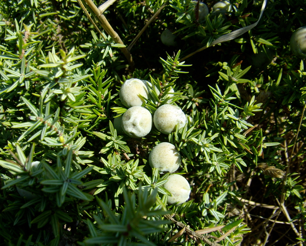 Bayas de enebro marítimo Juniperus macrocarpa. Playa de Valdevaqueros, Punta Paloma, Tarifa 36°04'N 5°42'W